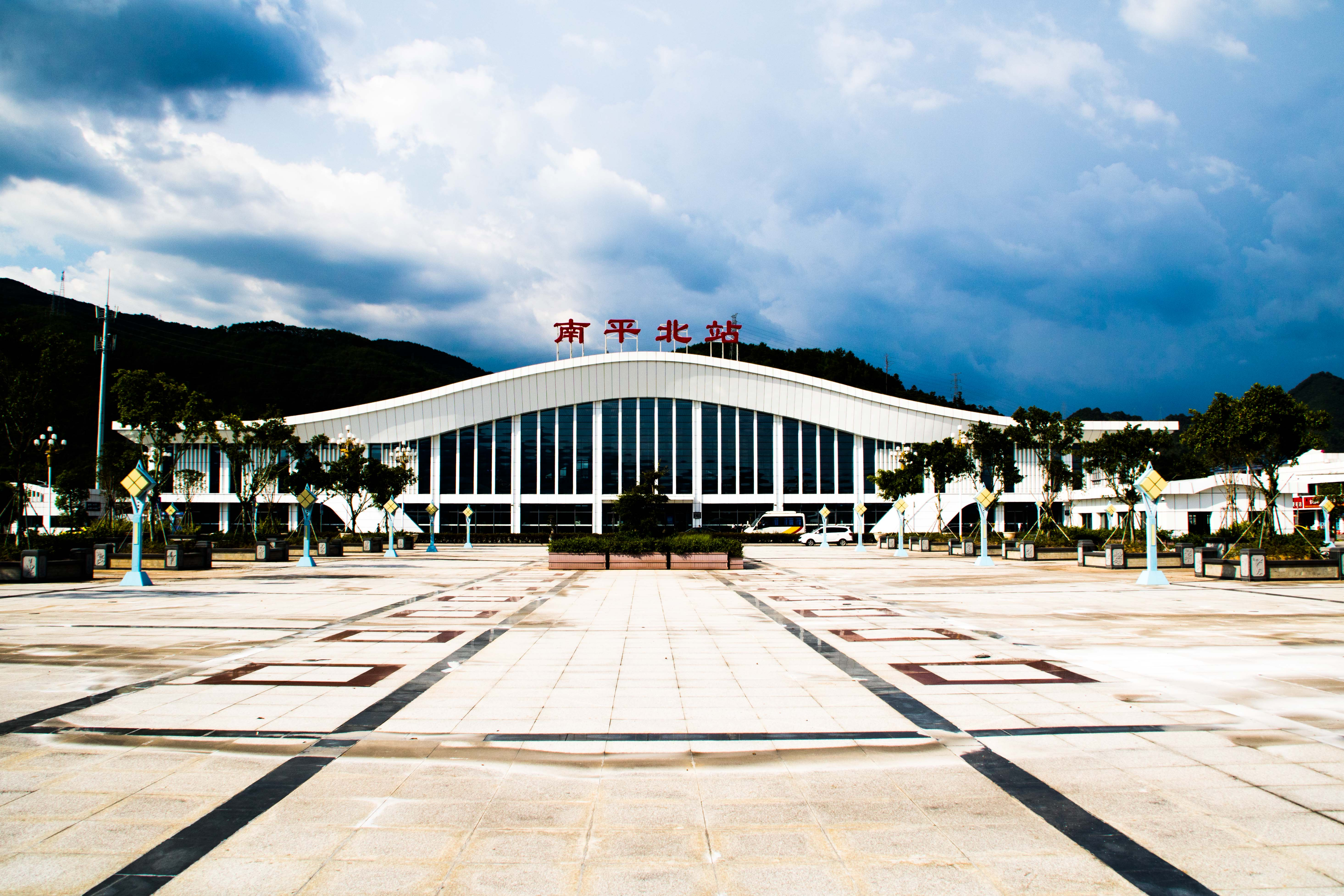 中文（中国大陆）: 南平北站站房